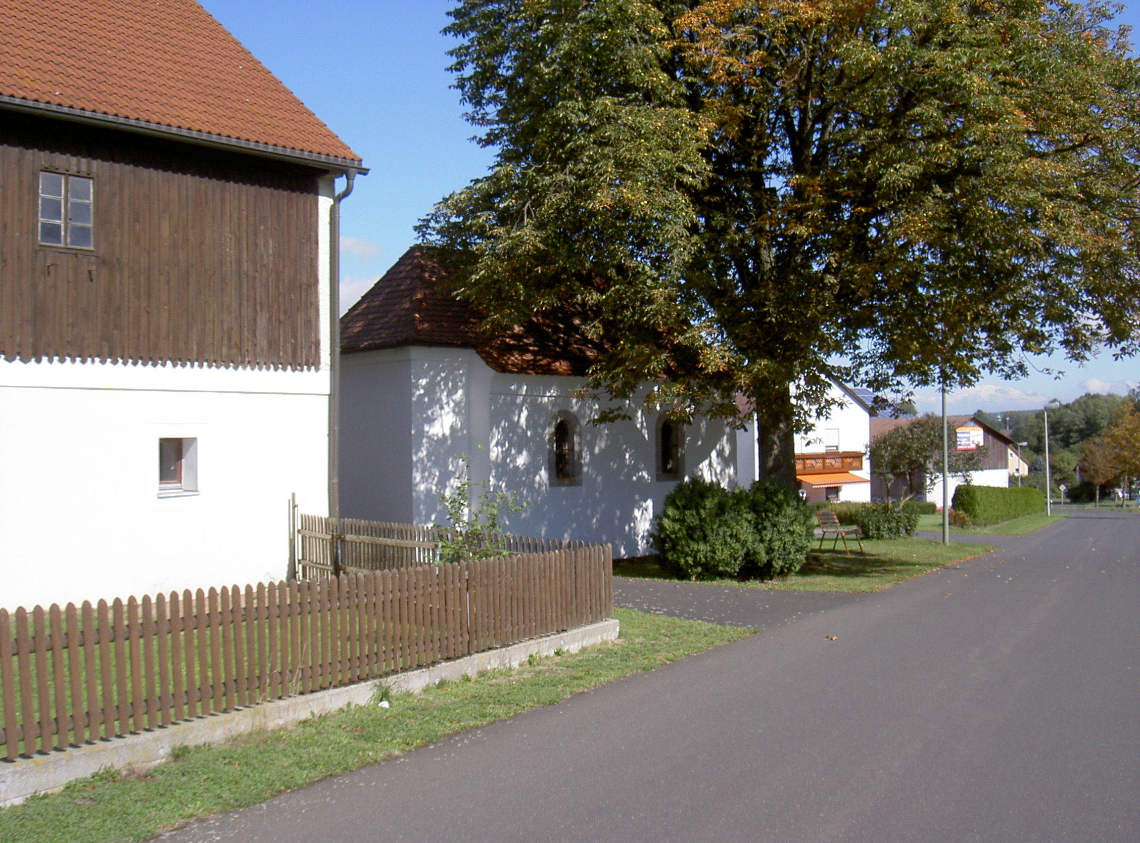 Kondrau